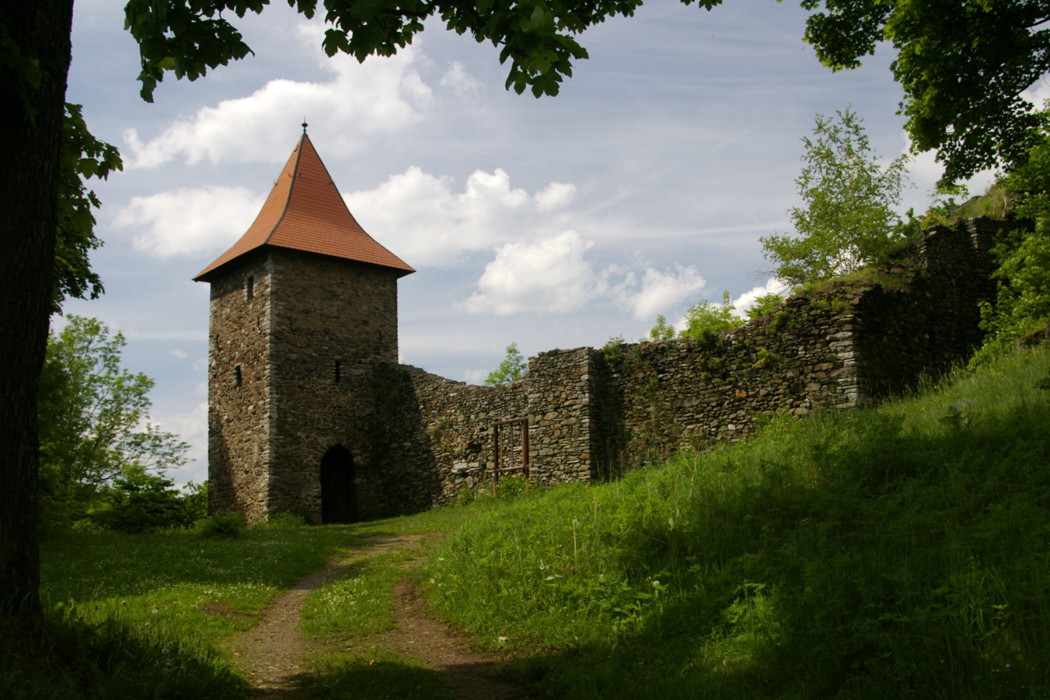 Burgruine Wiedersberg, Eingang